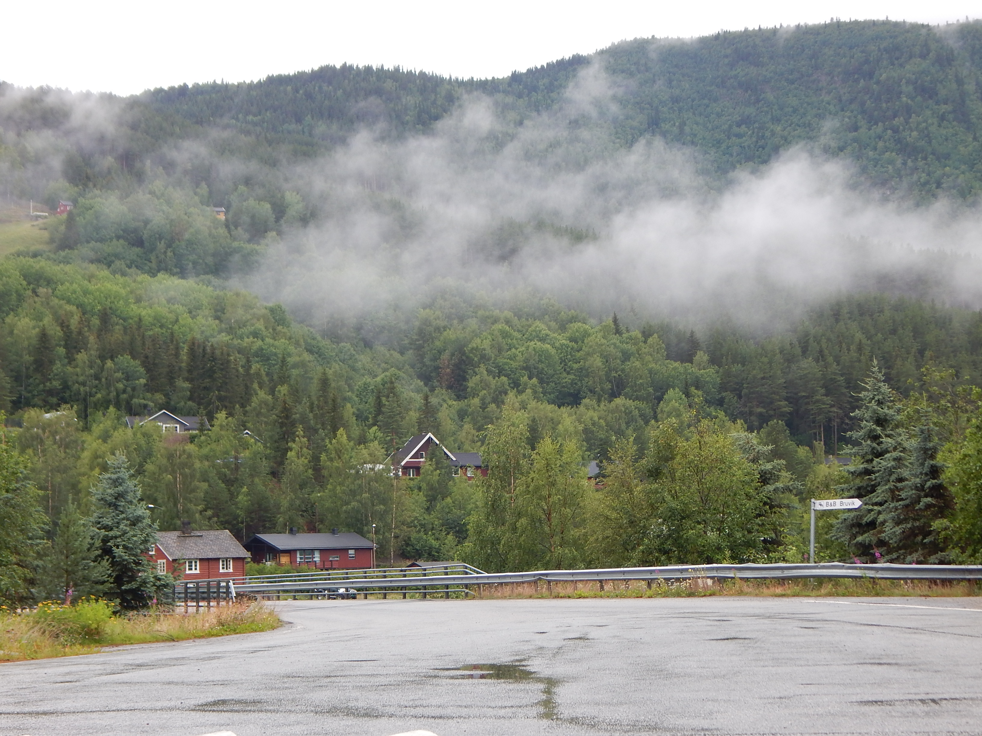 Fylkesvei 456 ved Lalm